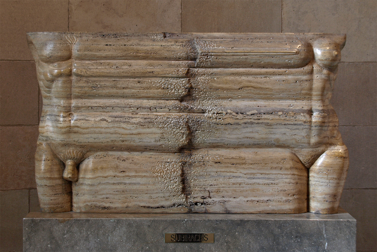 Matèria i forma (Josep María Subirachs)